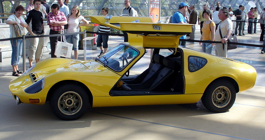 Melkus RS1000